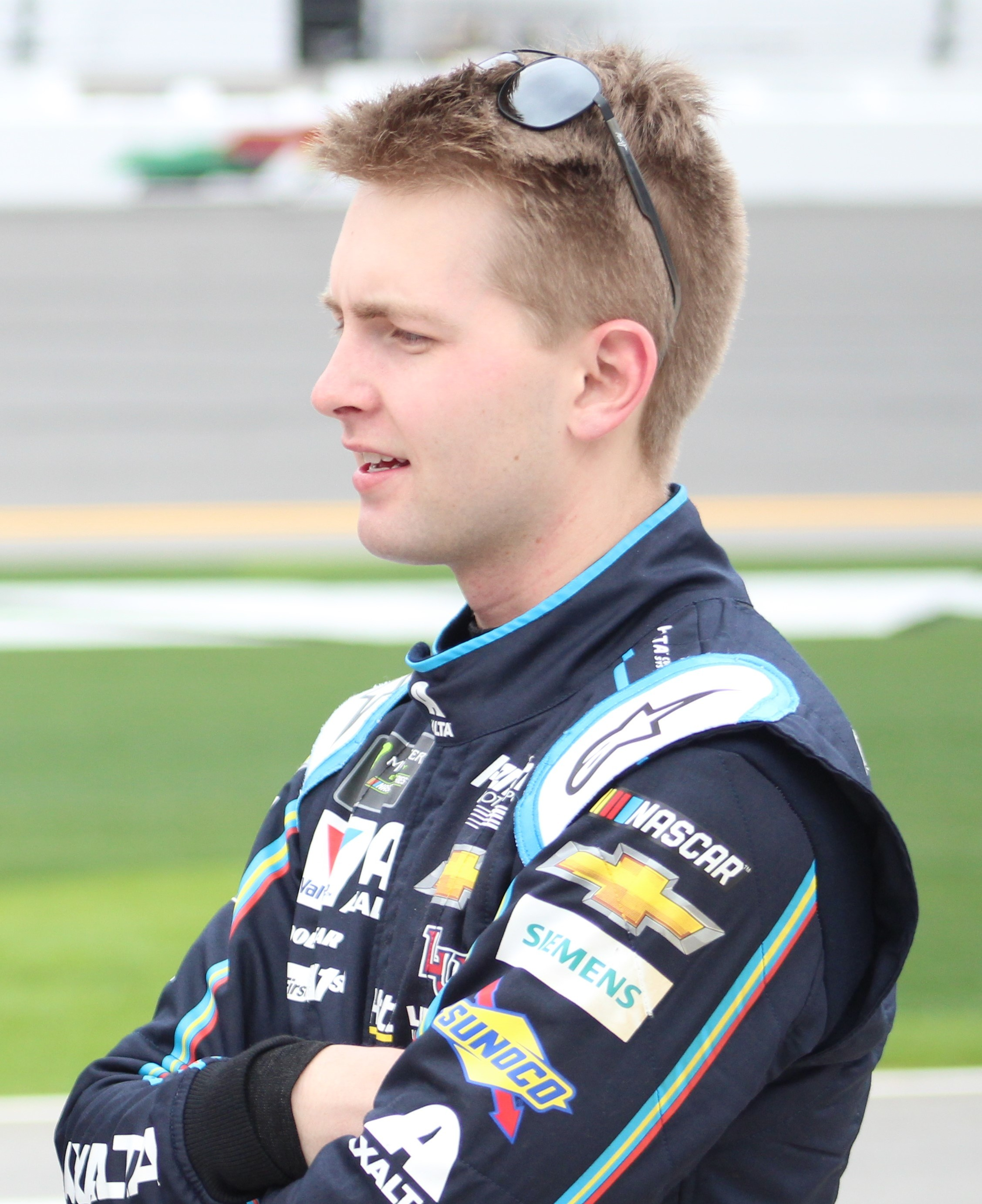 2019 Daytona 500